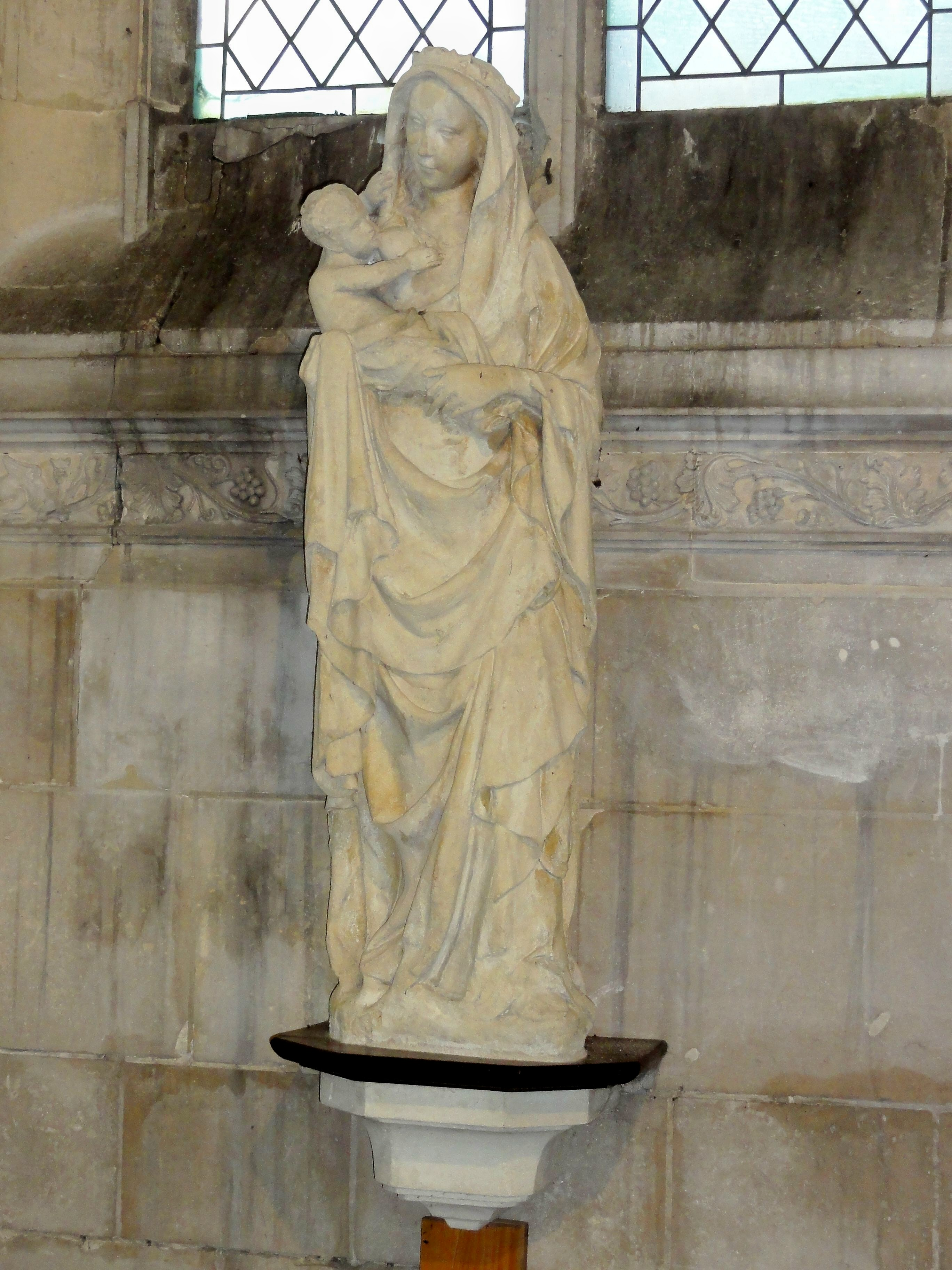 Vierge à l'Enfant allaitante du dernier quart du XIVe siècle.